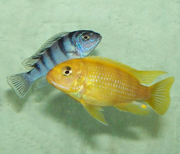 Maylandia lombardoi/Metriaclima lombardoi (= Pseudotropheus lombardoi) male (front) and female (back)